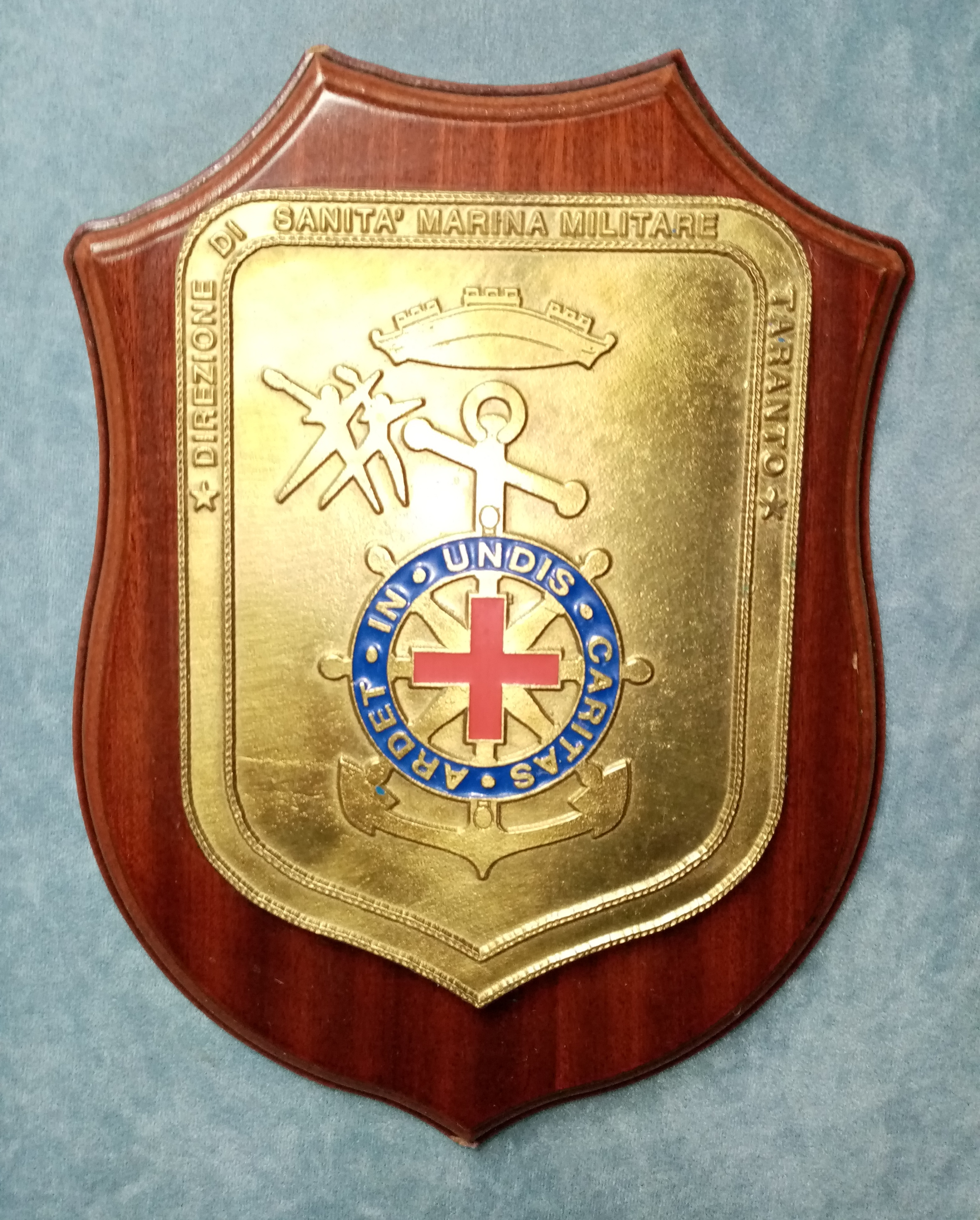 Crest della Direzione di Sanità Marina Militare di Taranto